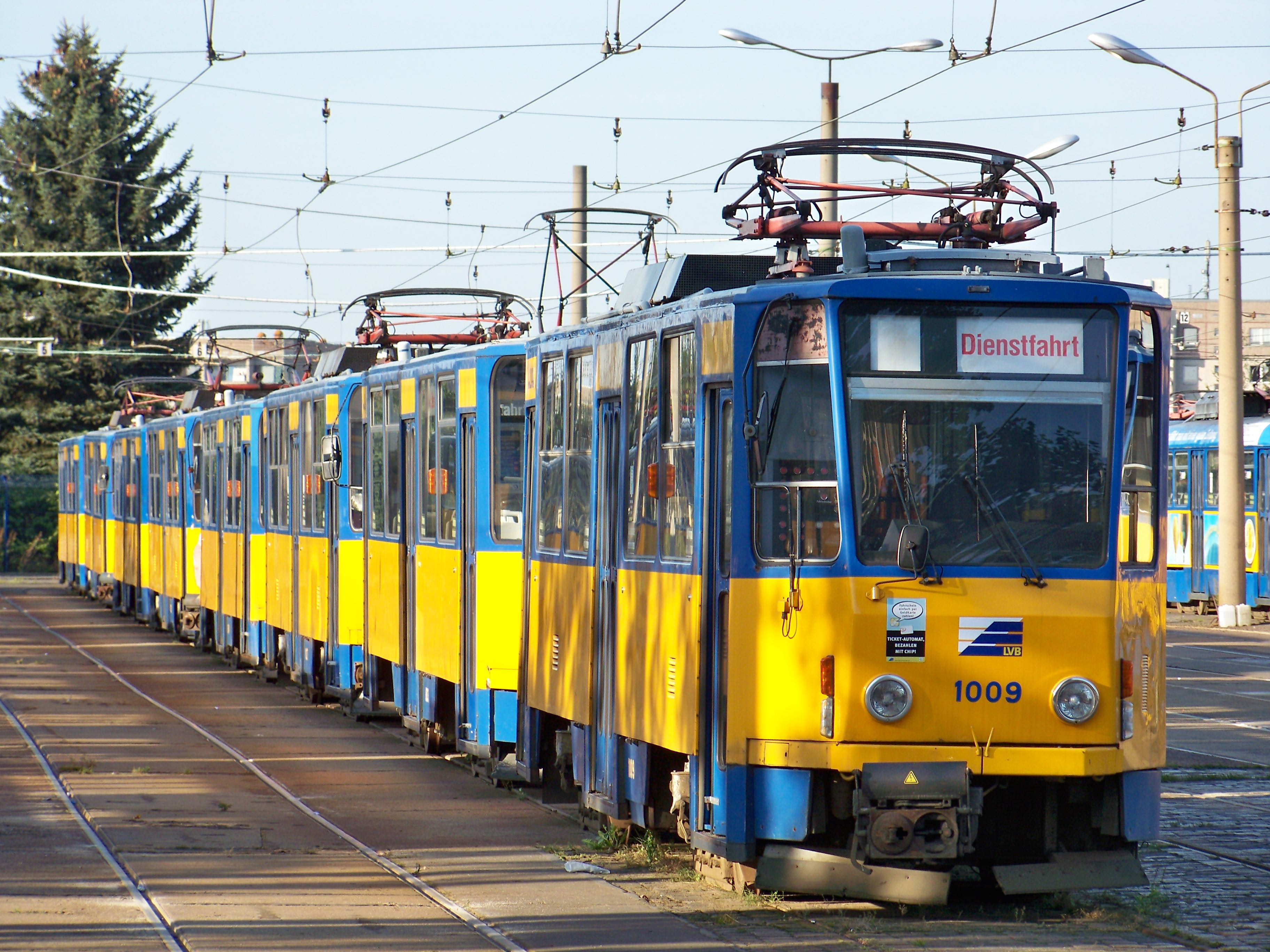 Vier Tatra T6A2 mit jeweils einem Beiwagen im Straßenbahnhof Paunsdorf in Leipzig